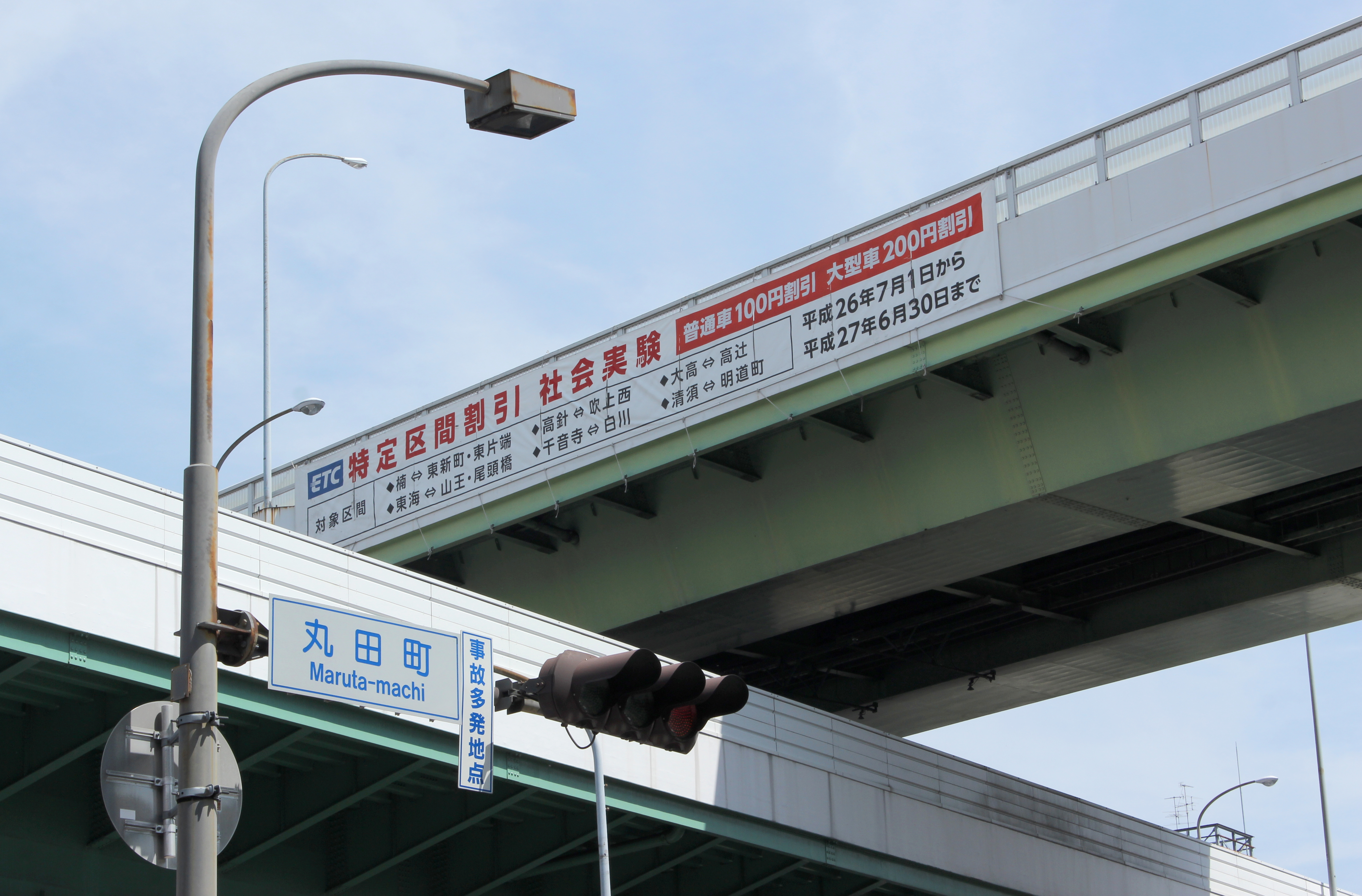 名高速ETC末端区間割引実験告知の垂れ幕（丸田町JCT）2015年5月30日撮影